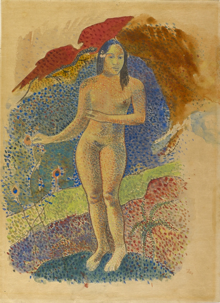 Te nave nave fenua représente Teha'amana, la compagne du peintre Paul Gauguin en 1892. Lavis à l'encre de chine, aquarelle et gouache sur papier, 29,5 x 21,8 cm